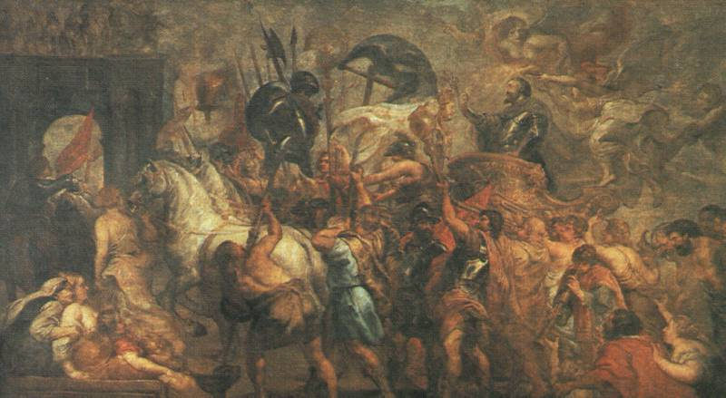 Einzug von Heinrich IV. von Frankreich in Paris, Ölgemälde von Peter Paul Rubens